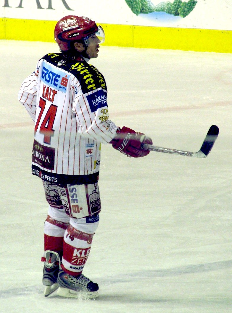 Dieter Kalt 301009.jpg